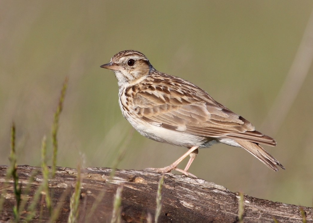 Škovránok stromový (Lullula arborea); Wood Lark PR Ostrov Kopáč